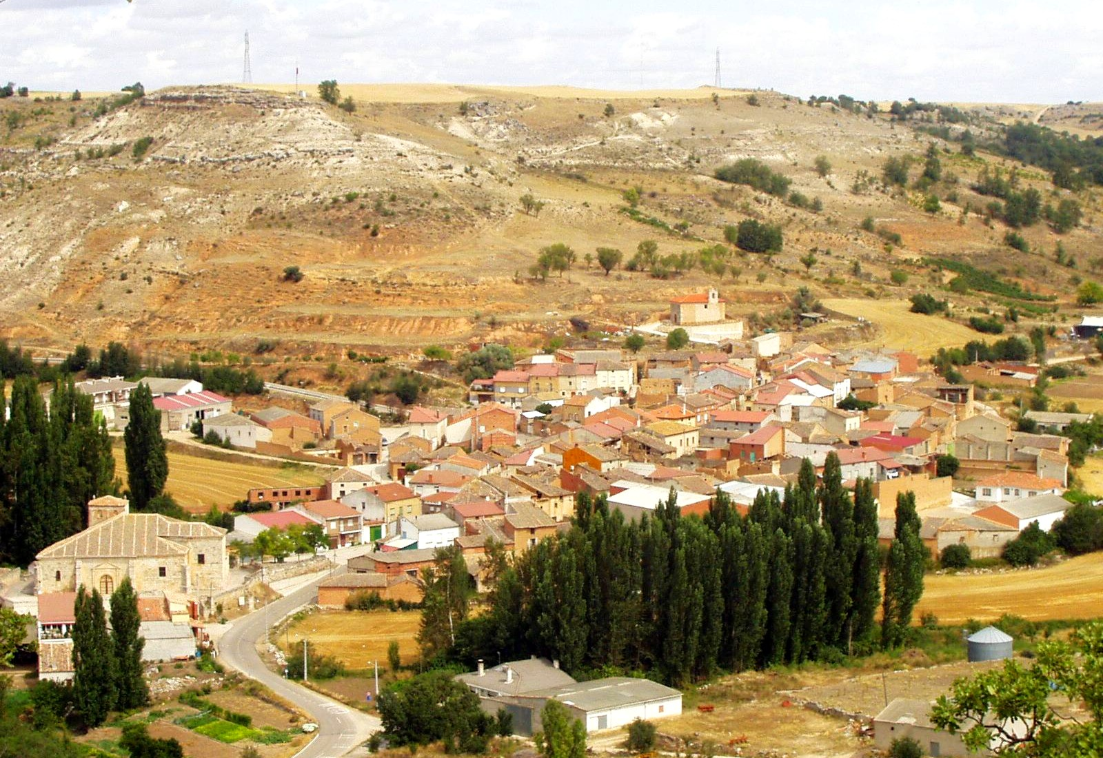 Corrales de Duero. Pueblo, Iglesia, Ermita, Valdemoral